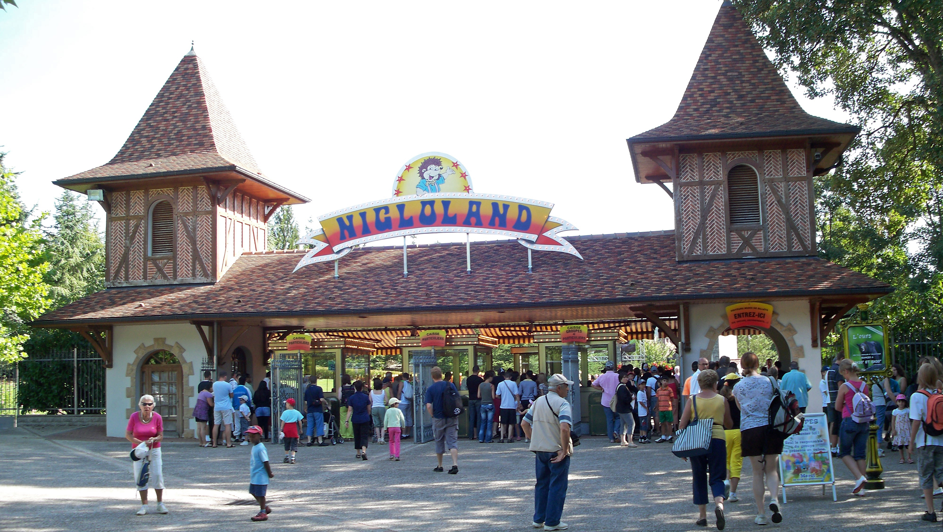 Entrée du parc Nigloland à Dolancourt dans l'Aube.